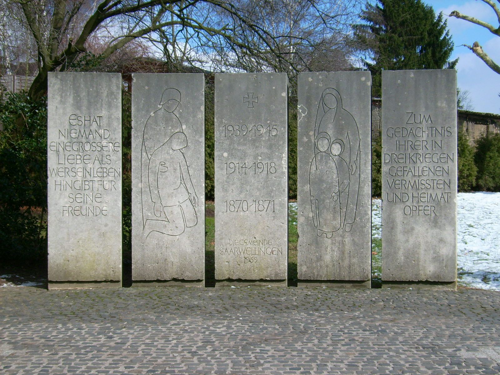 Kriegerdenkmal Saarwellingen